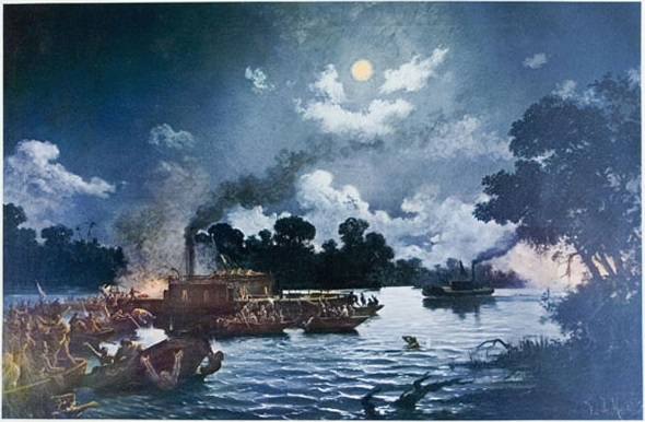 Abordagem do encouraçado Barroso e do monitor Rio Grande pelos paraguaios.